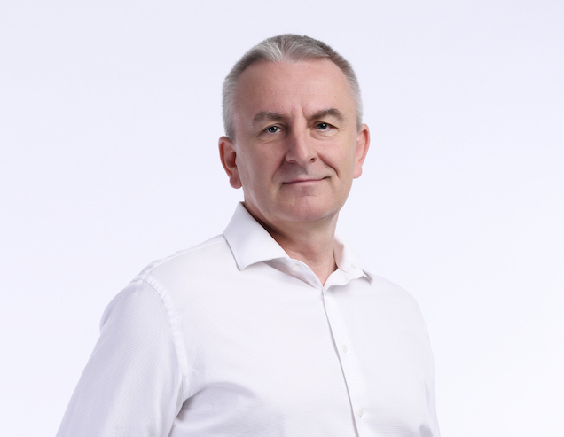 Pavel Staněk (politik ANO 2011)